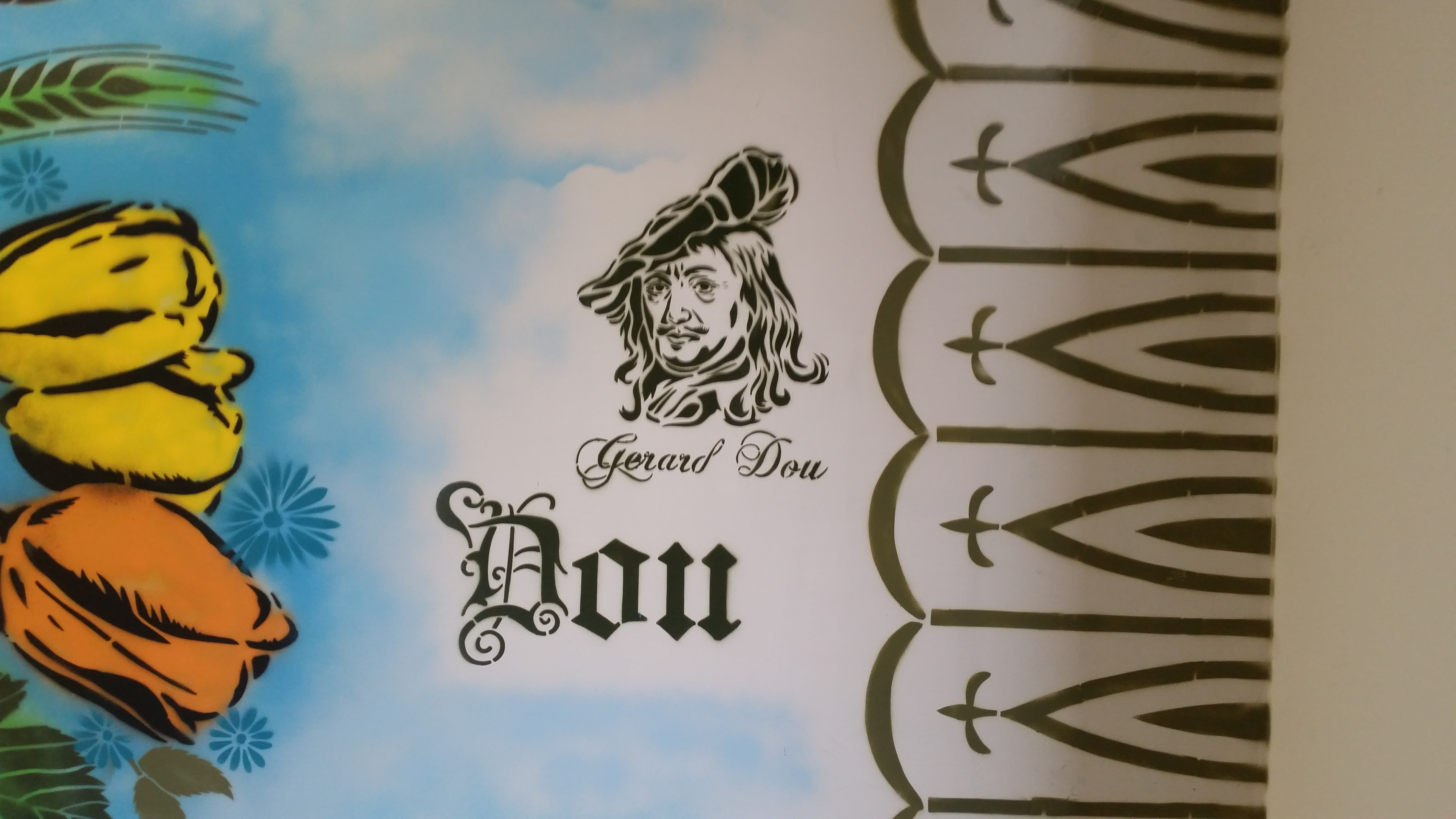 Kunstwerk van Hugo Kaagman, G Doustraat 156, Amsterdam